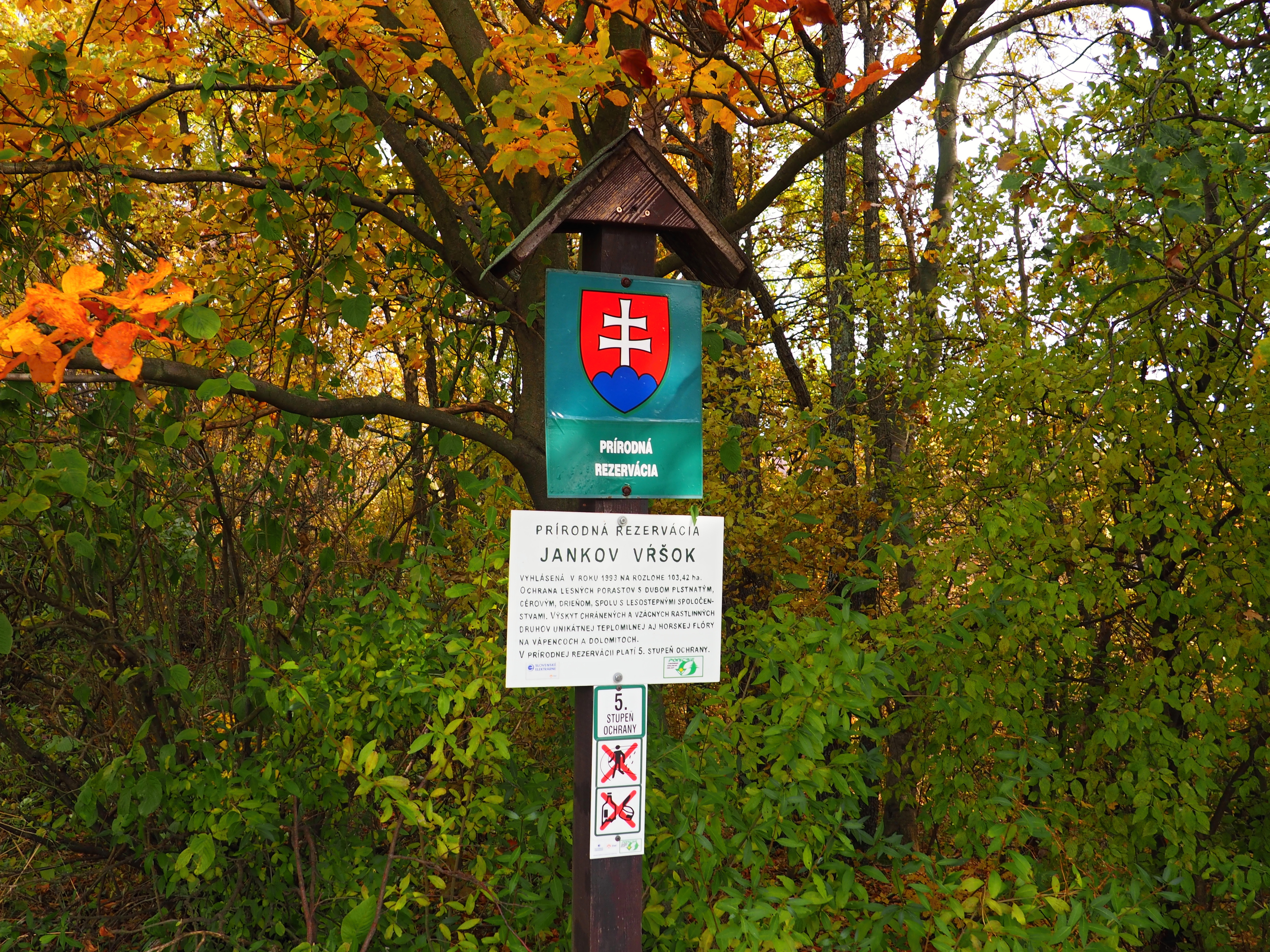 Přírodní rezervace Jankov vŕšok